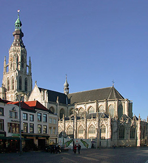 Grote of Onze-Lieve-Vrouwekerk is het belangrijkste monument van Breda.